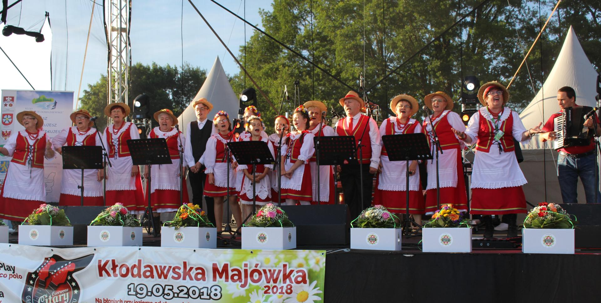 Zespół 'Kłodawianki'